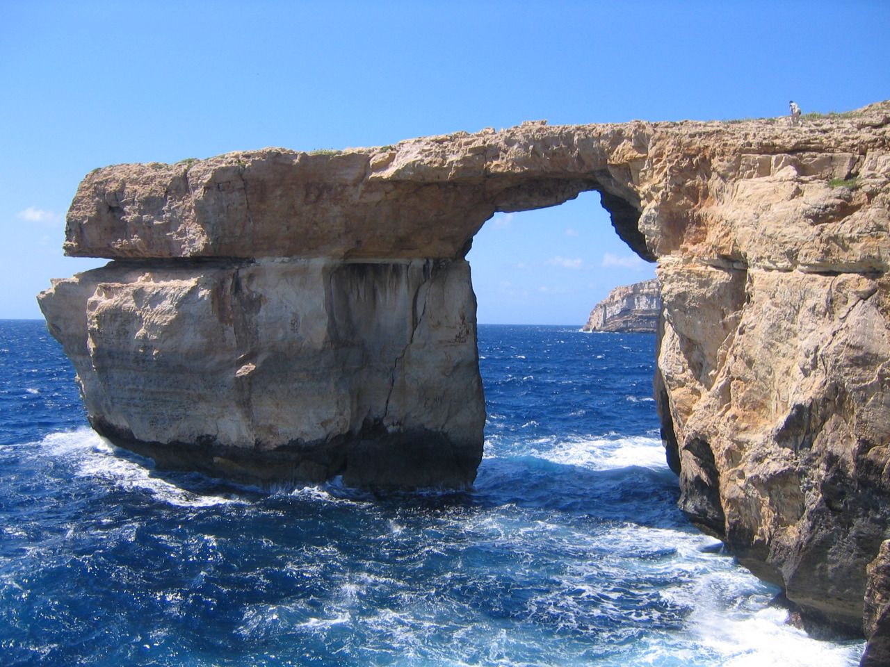 Azure Window, Dwejra, Gozo, Republic of Malta